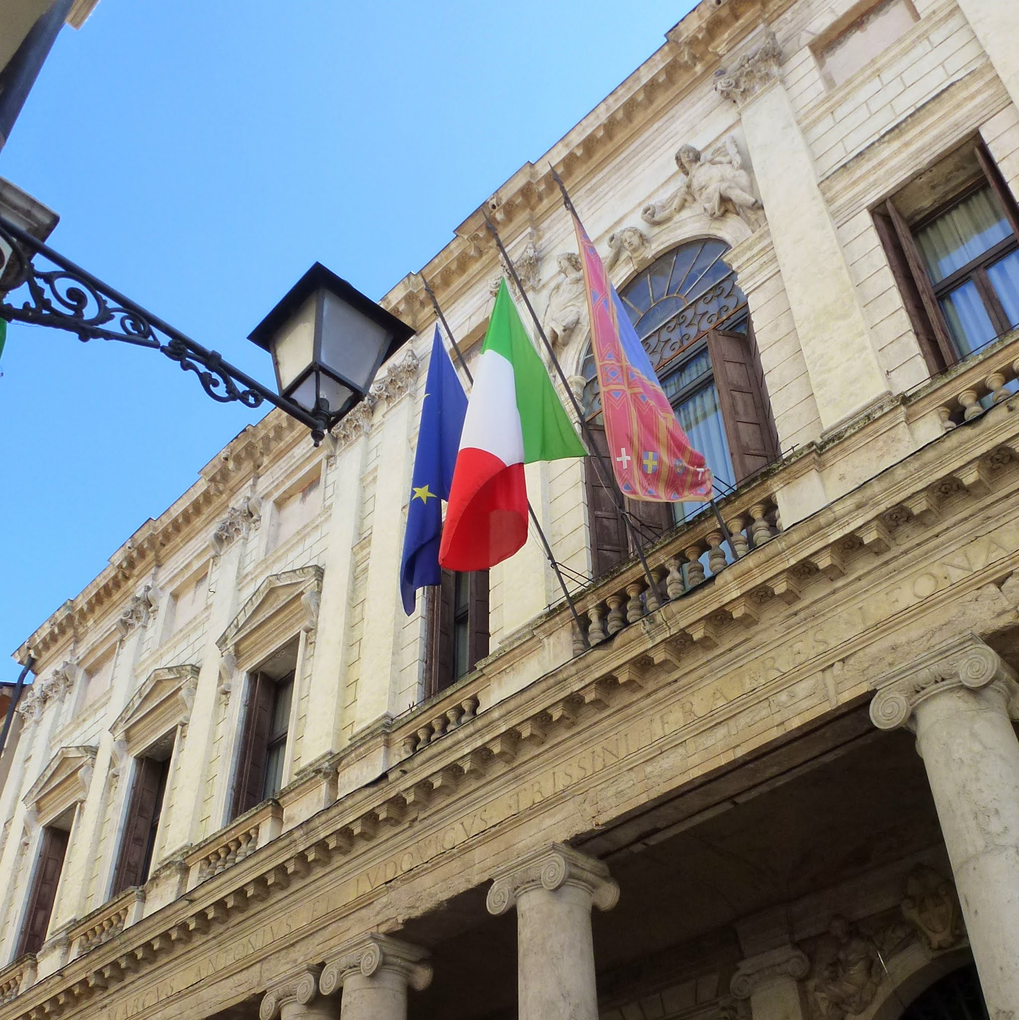 Vicenza